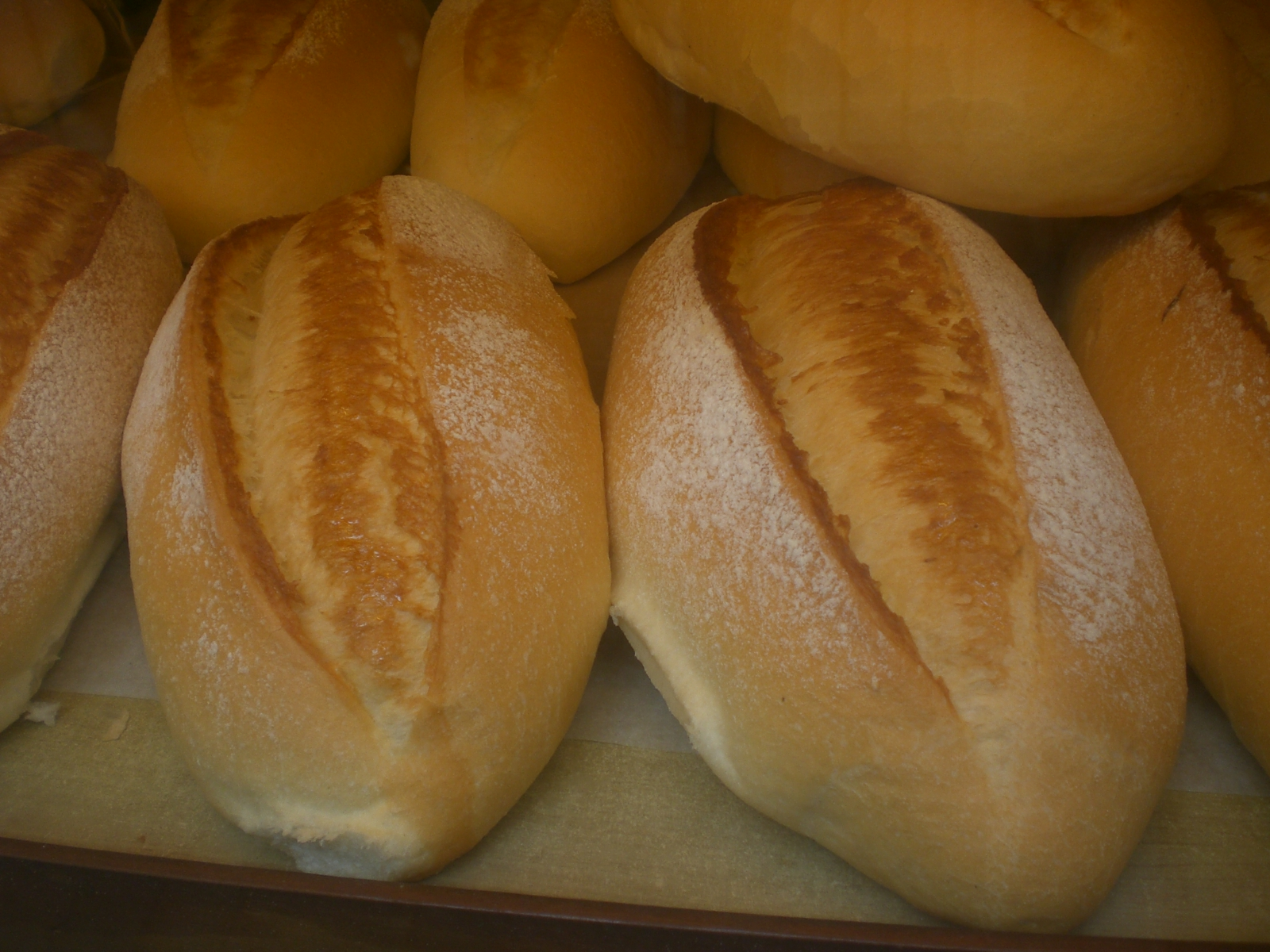 豬仔包